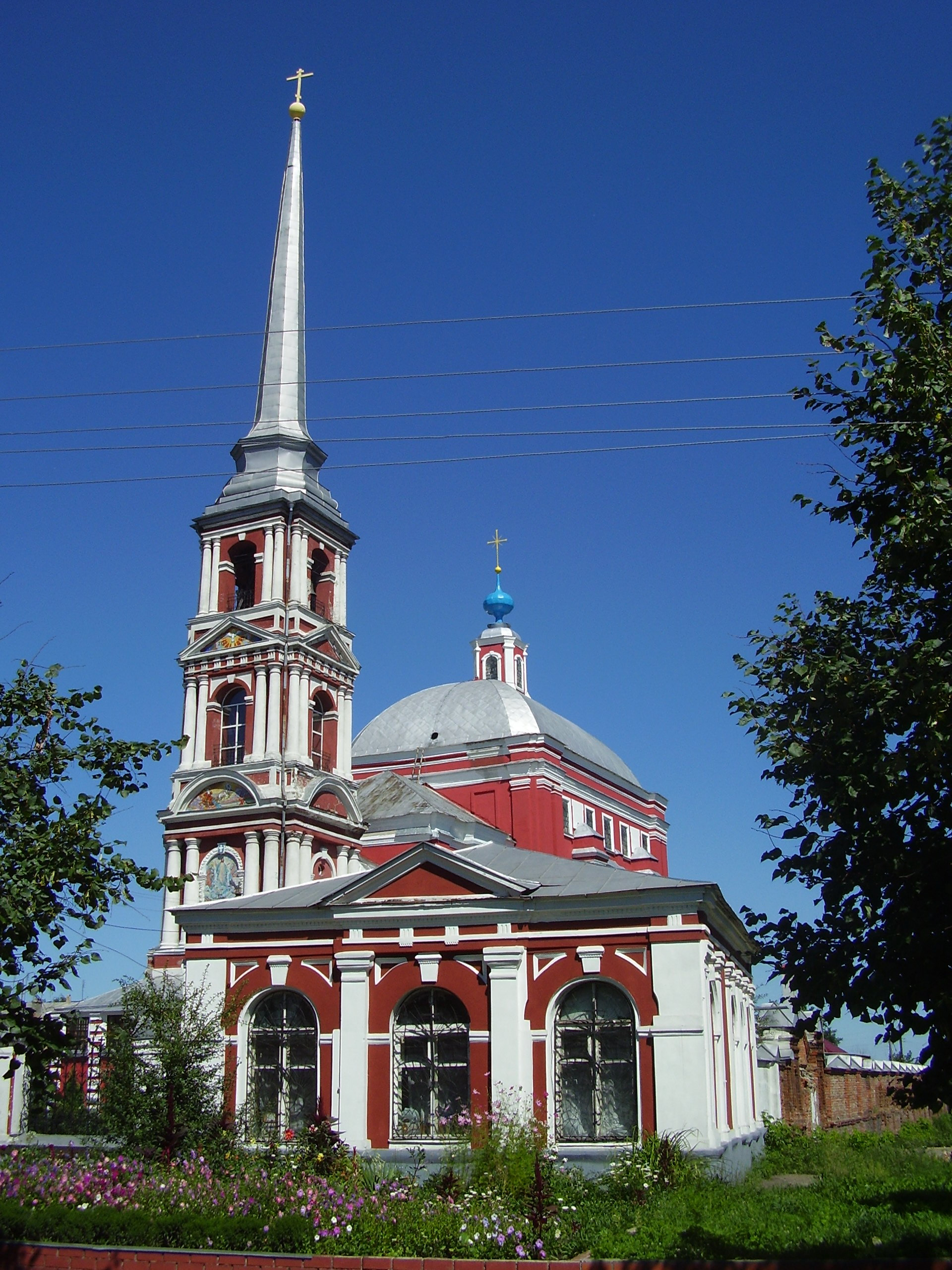 Мичуринск,Ильинская церковь